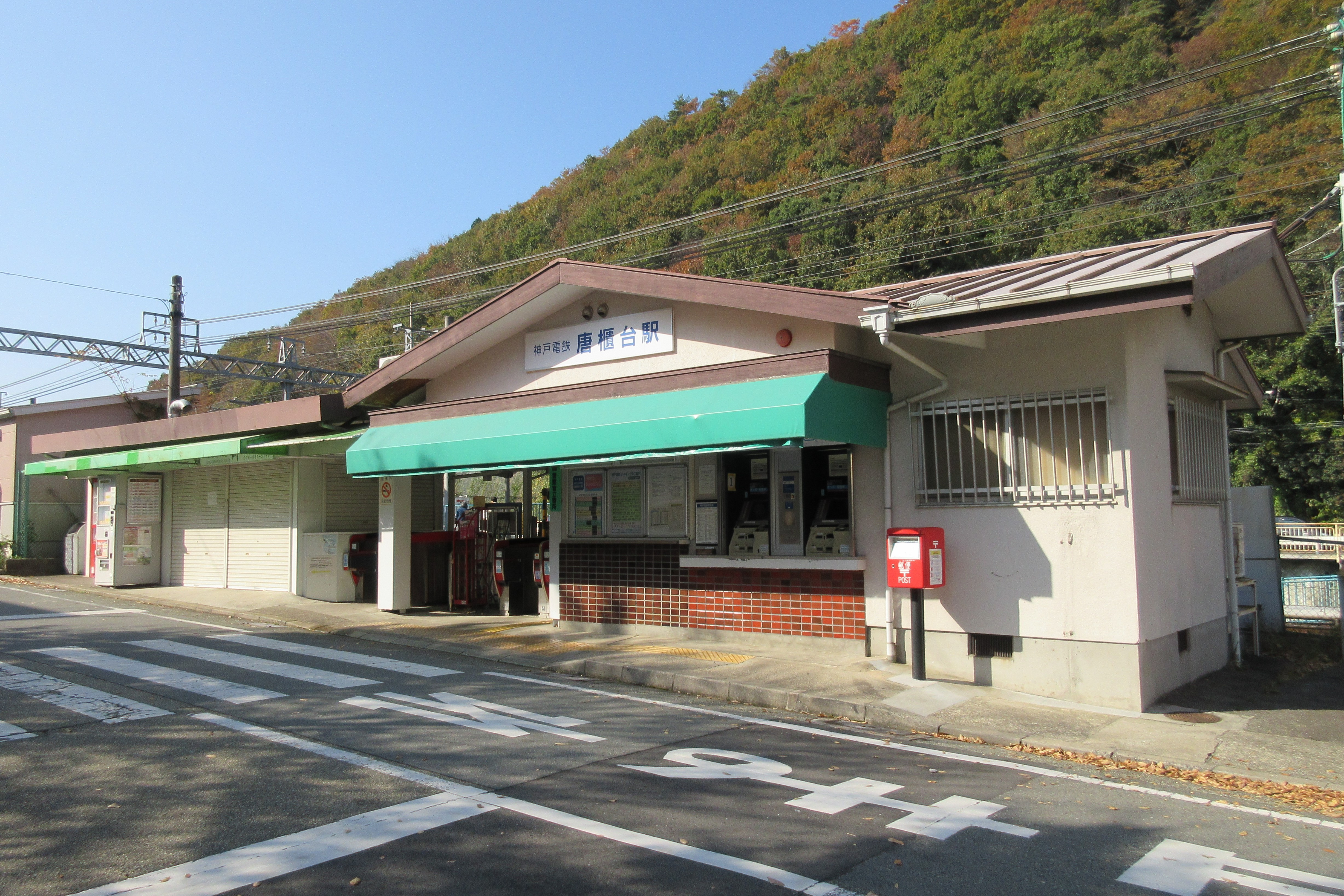 神戸電鉄唐櫃台駅